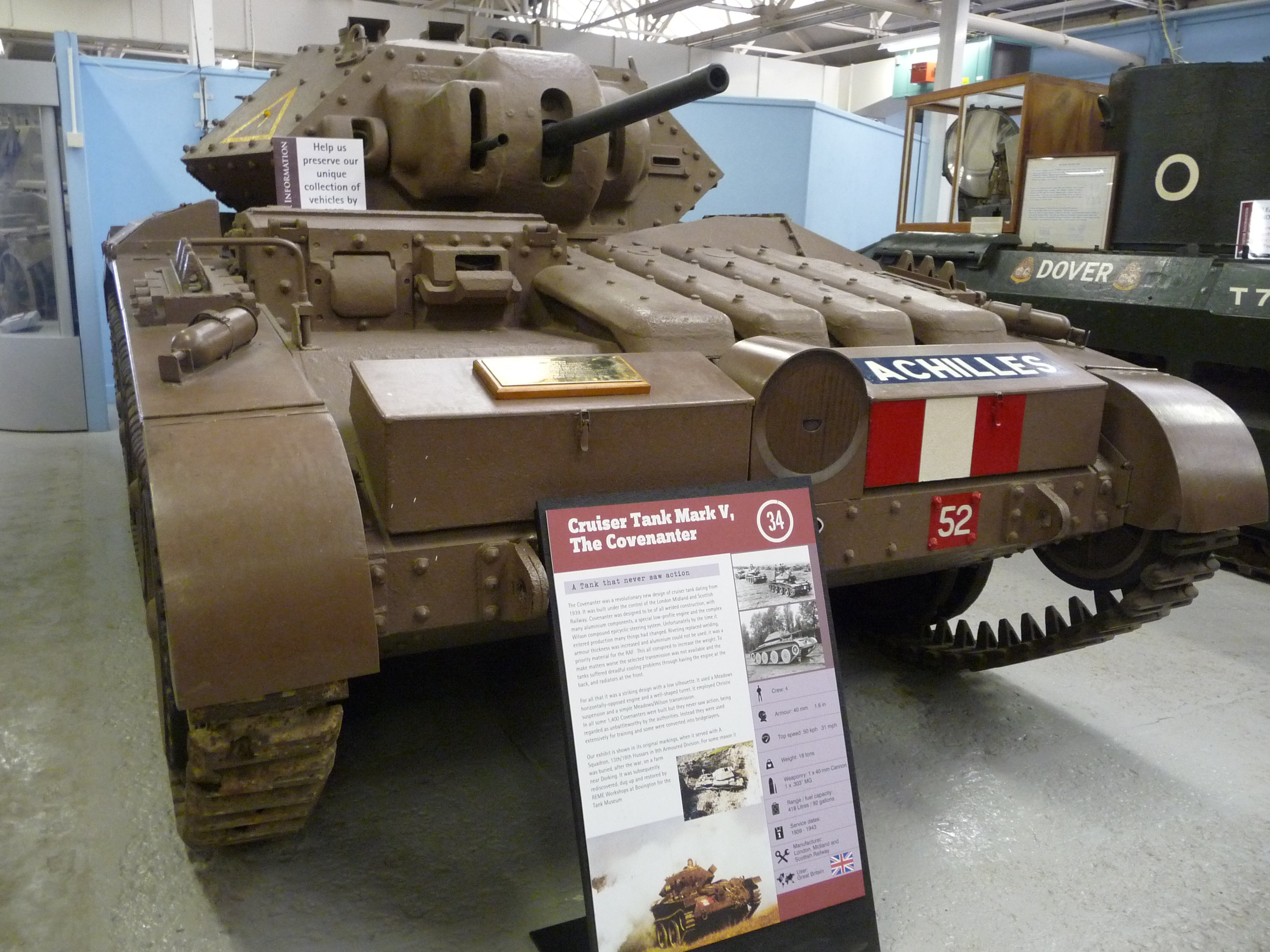 Tank Cruiser Mark V** A13